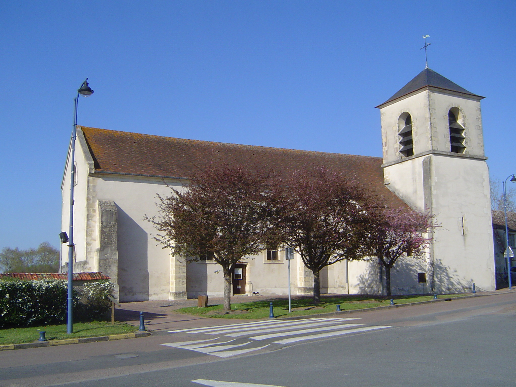 Sermoise - Eglise (1)